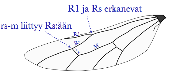 Yksinkertaistettu piirros ahmaspistiäisen (Ichneumonidae) takasiivestä. Kuvaan on lisätty tekstiä joka selventää miten ahmaspistiäiset (Ichneumonidae) erottaa vainopistiäisistä (Braconidae). Siipisuonet on nimetty Gauldin mukaisesti (The Ichneumonidae of Costa Rica; 1991).